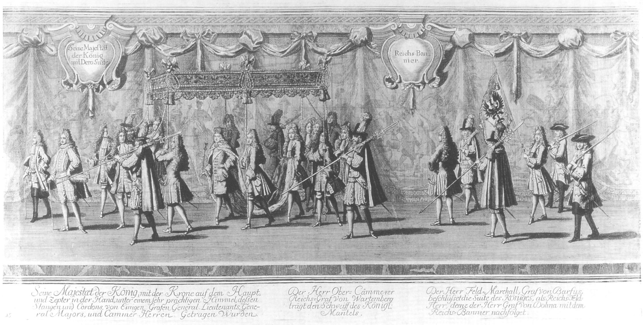 Der Königlich-Preüßischen Crönung Hochfeÿerliche Solemnitäten, Blatt 15 Seine Majestät der König mit Dero Suite Reichs-Bannier Seine Majestæt der König, mit der Krone auf dem Haupt und Zepter in der Hand, unter einem sehr prächtigen Himmel, dessen Stangen und Cordons von Einigen Grafen GeneralLieutenants, GeneralMajors und Cammer Herren Getragen Wurden Der Herr Ober-Cämmerer Reichs-Graf von Wartemberg trägt den Schweiff des Königl. Mantels Der Herr Feld-Marschall, Graf von Barfus, beschlüsset die Suite des Königes, als Reichs-Feld-Herr, deme der Herr Graf von Dohna mit dem Reichs-Bannier nachfolget